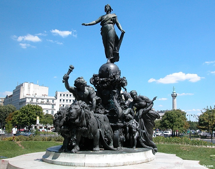 Aurteur (Aimé-Jules Dalou) mort il y a plus de 70 ans